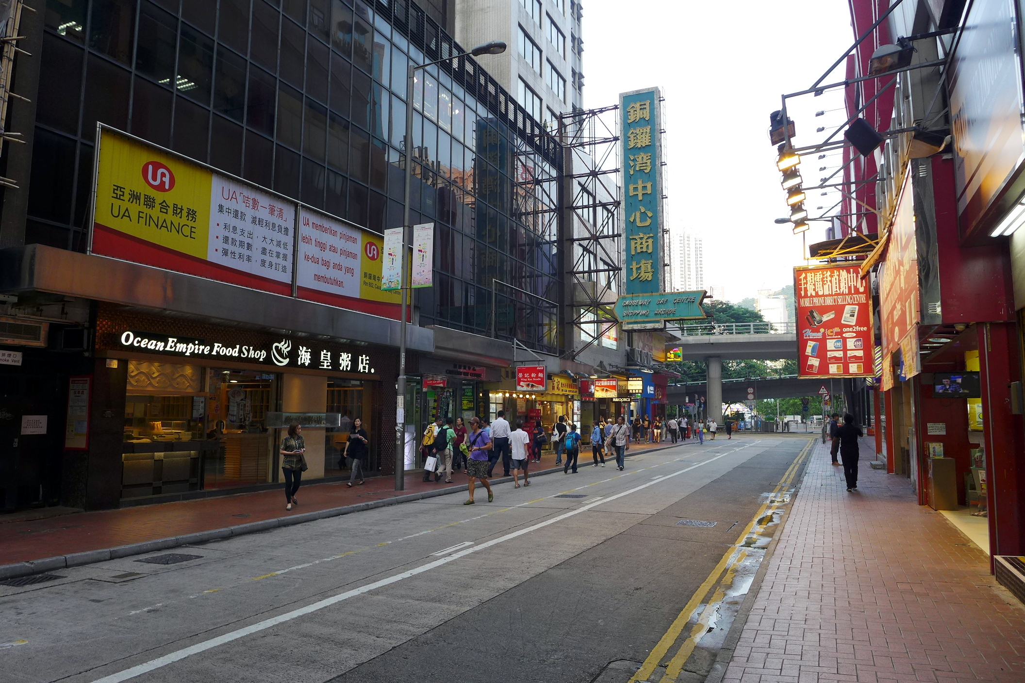 Sugar Street 糖街